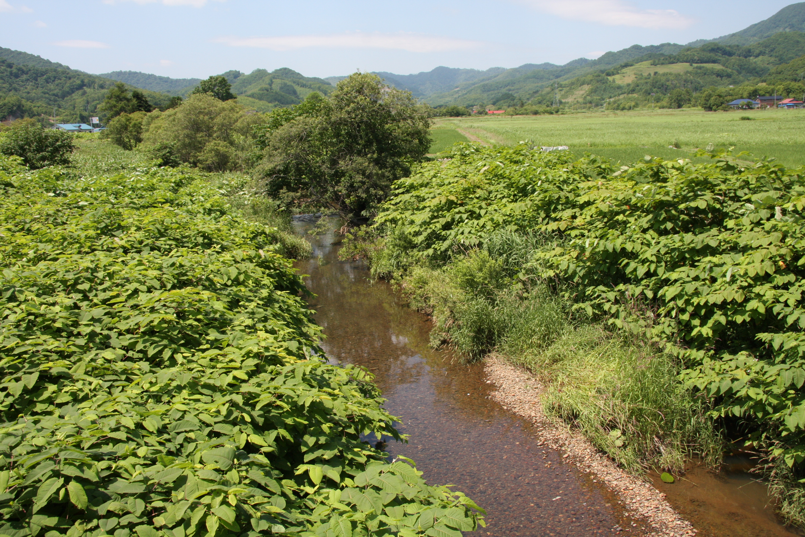 小鉾岸川（豊浦町大岸） 国道大岸橋より上流を望む